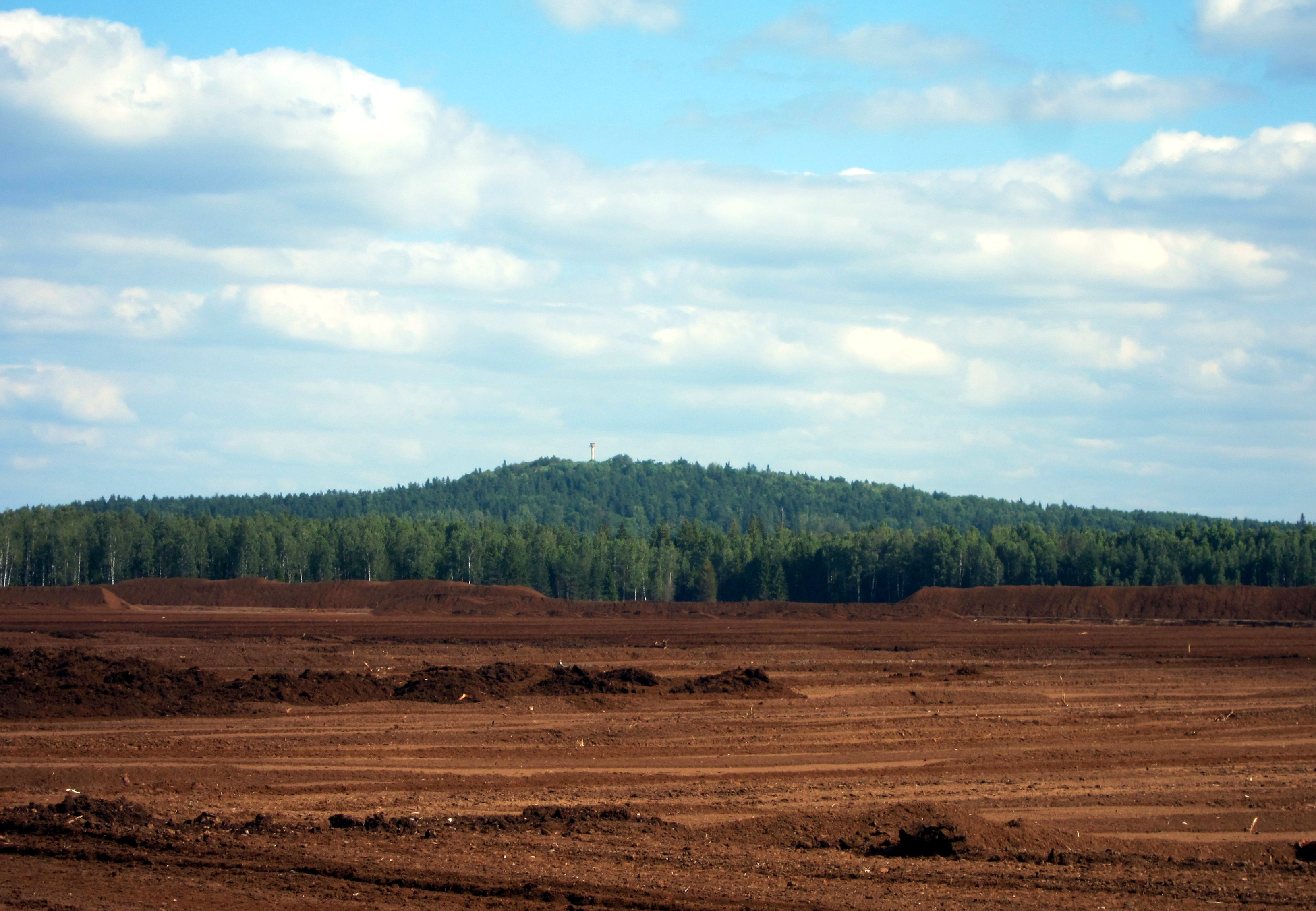 Zilais kalns ar Upurakmeni - kulta vieta un viduslaiku kapsēta, Kocēnu pagasts. Zilaiskalns, skatoties no Zažēnu kūdras purva.